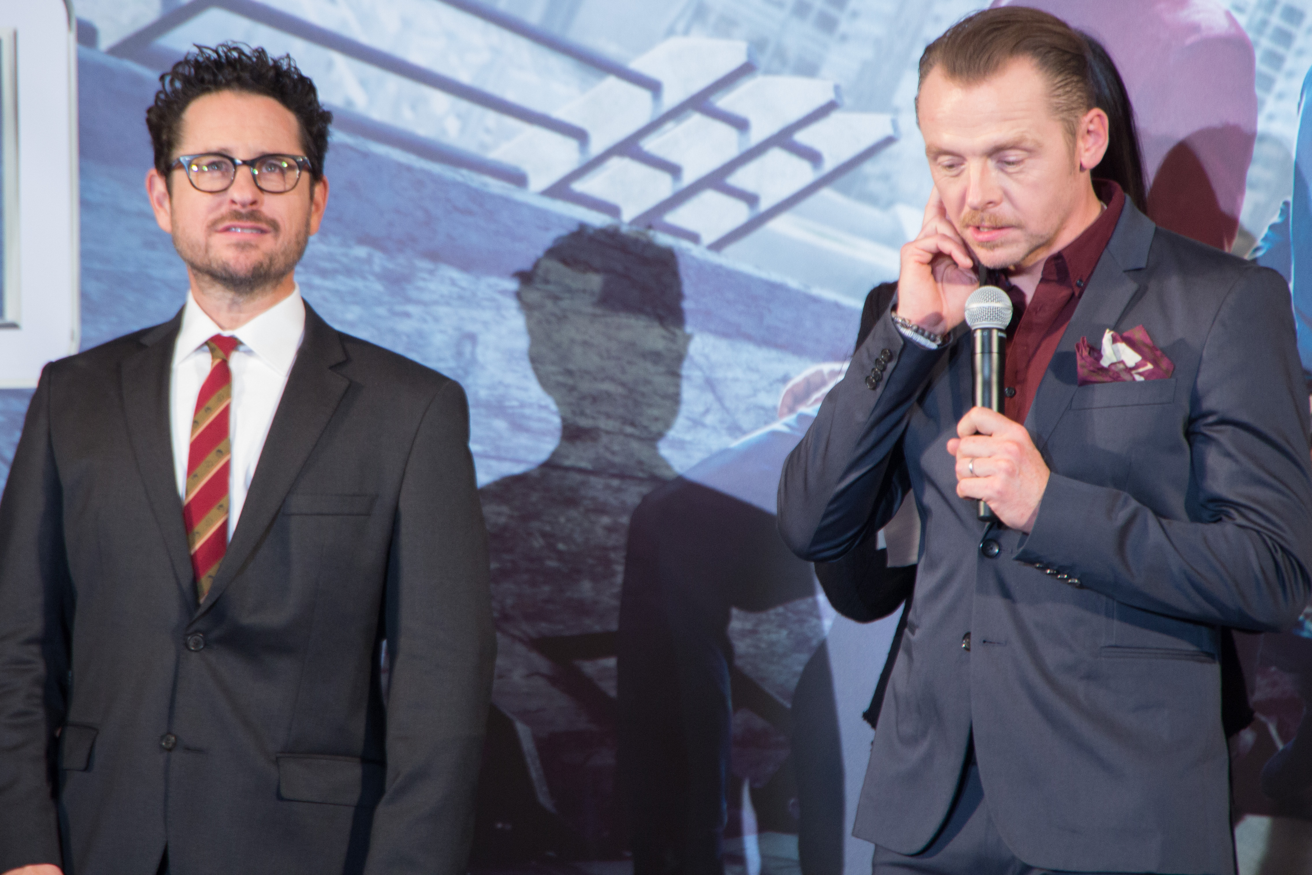 スター・トレック BEYOND ジャパン・プレミア レッドカーペット J・J・エイブラムス サイモン・ペッグ